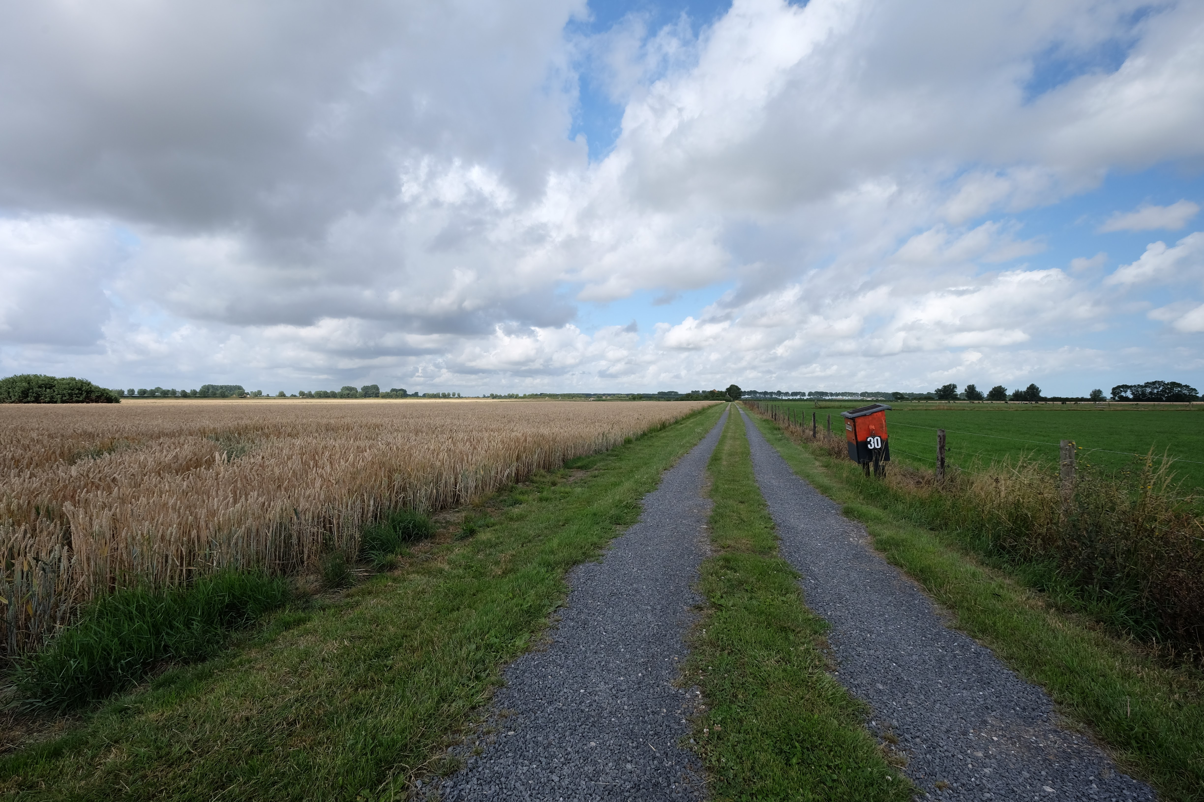 4503 Groede, Netherlands